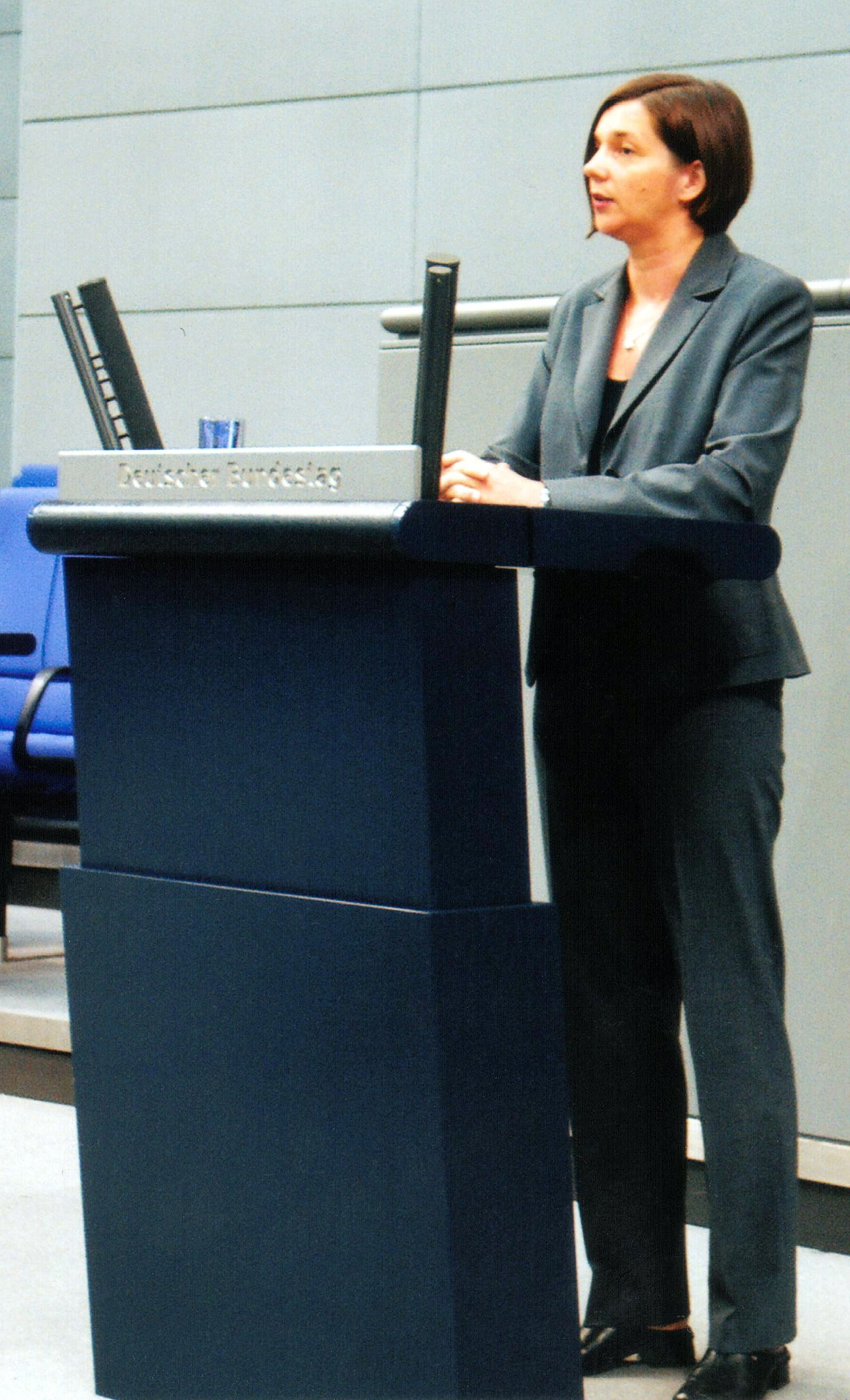 Katrin Göring-Eckardt während einer Rede im Deutschen Bundestag.